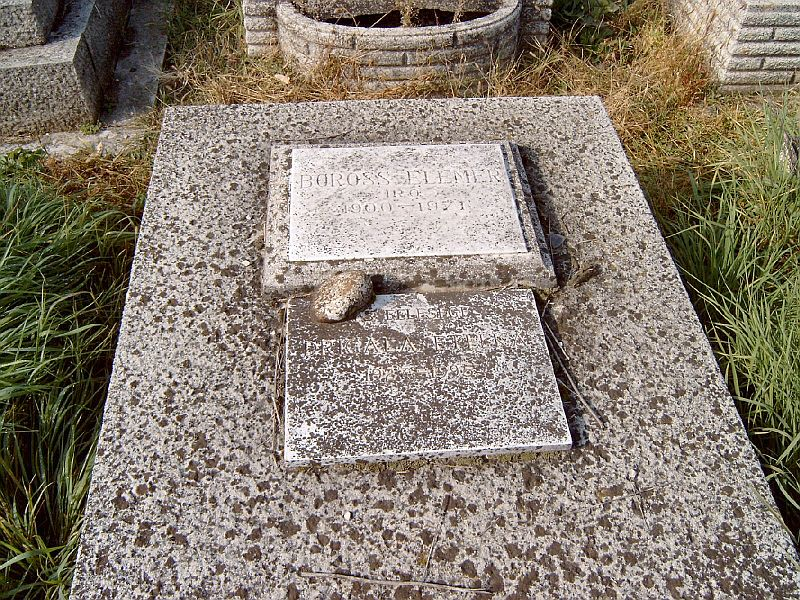 Boross Elemér (Szül.: Bronstein) (Budapest, 1900. február 4. – Budapest, 1971. november 26.) költő, színműíró, dramaturg sírja Budapesten. Kozma utcai izraelita temető: 5B-8-20